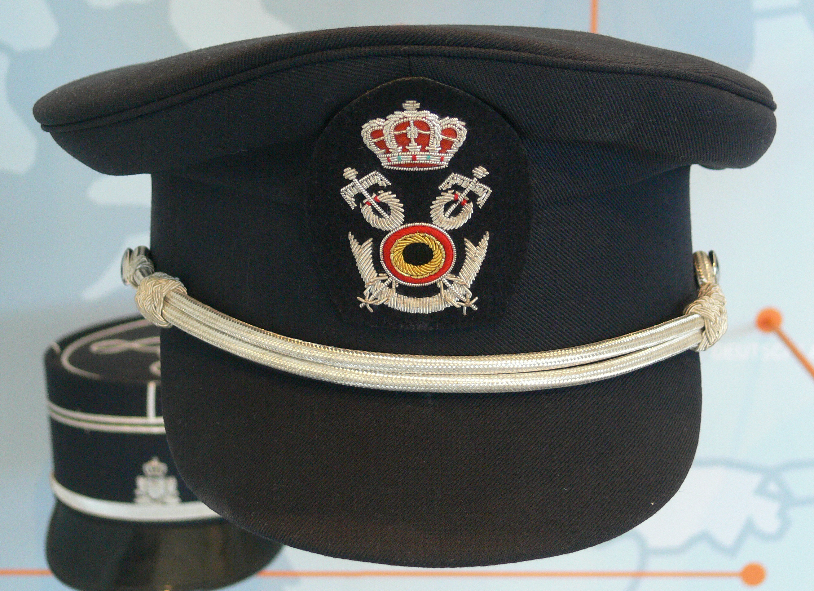 Hamburg, Deutsches Zollmuseum, Zollmütze aus Belgien